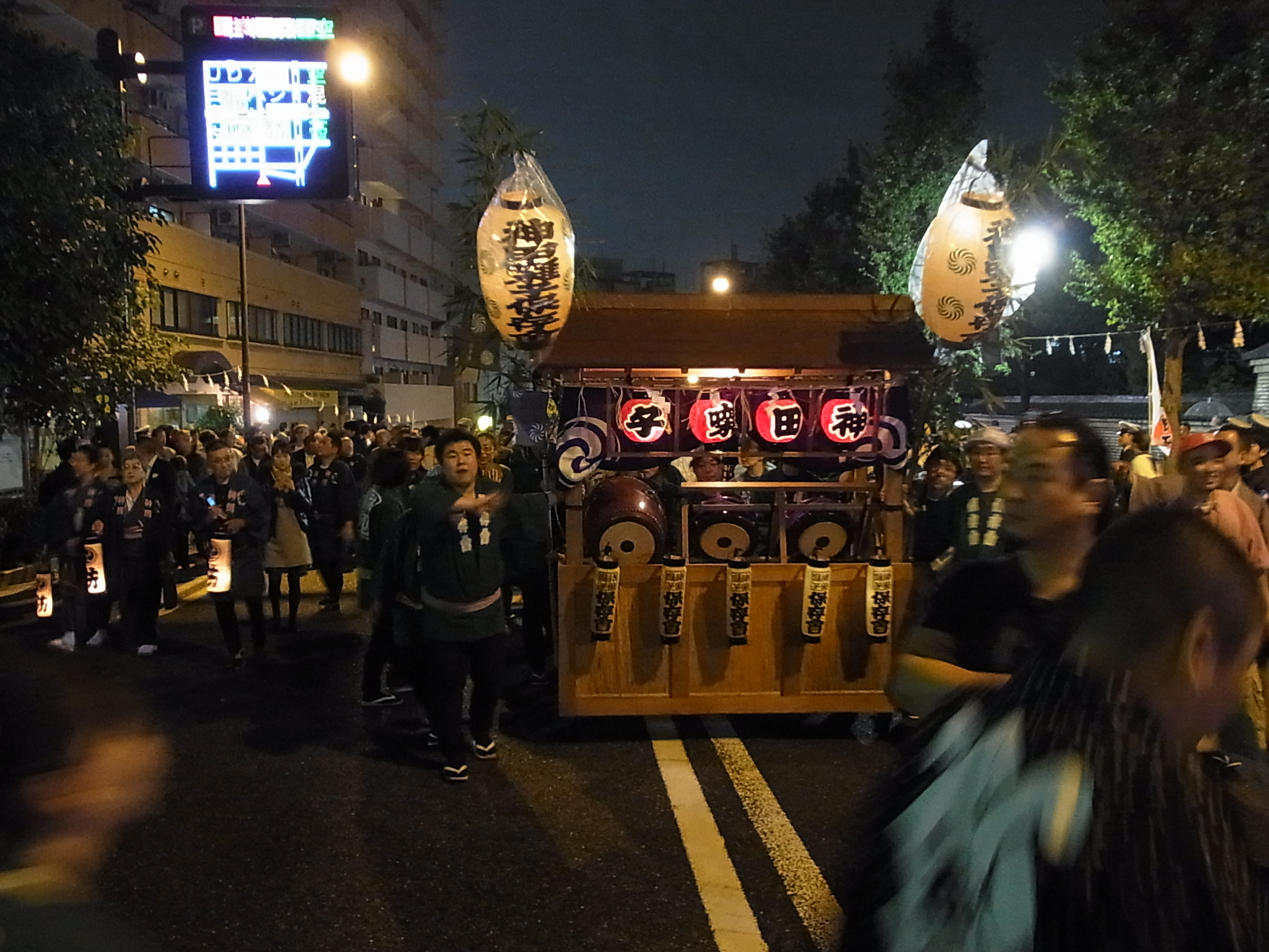 神田祭お囃子（2011.10.30）